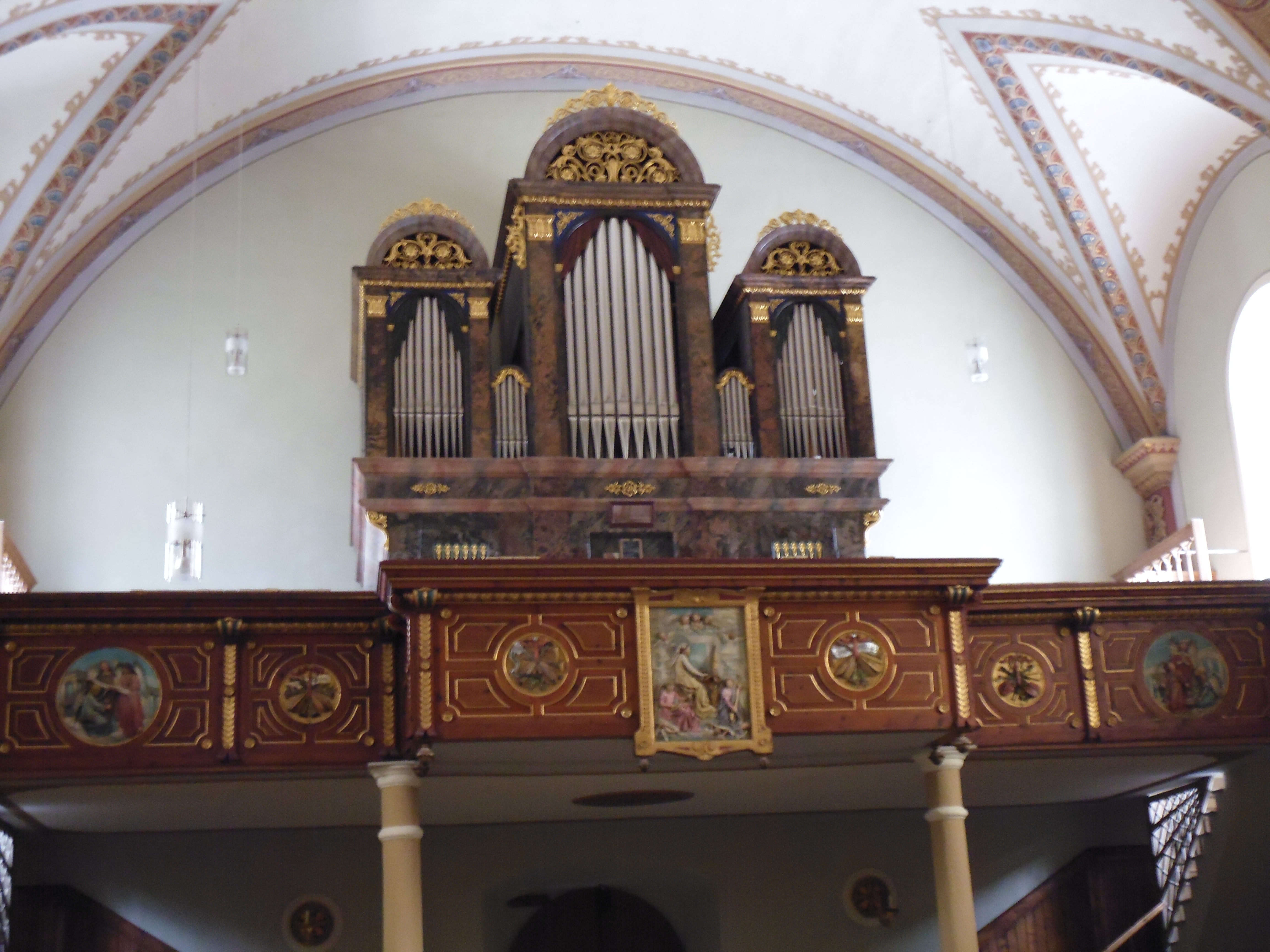 Innendetails der Pfarrkirche in Laas